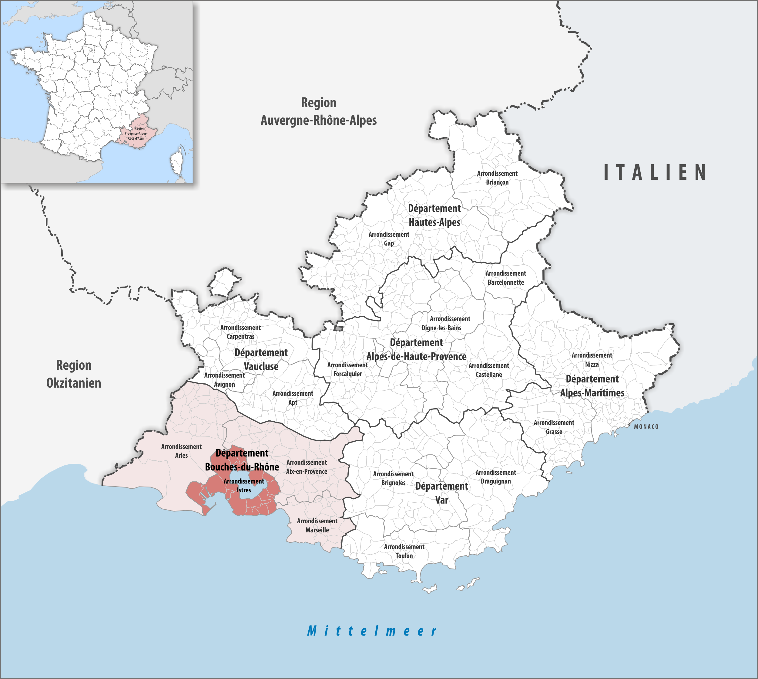 Lage des Arrondissements Istres